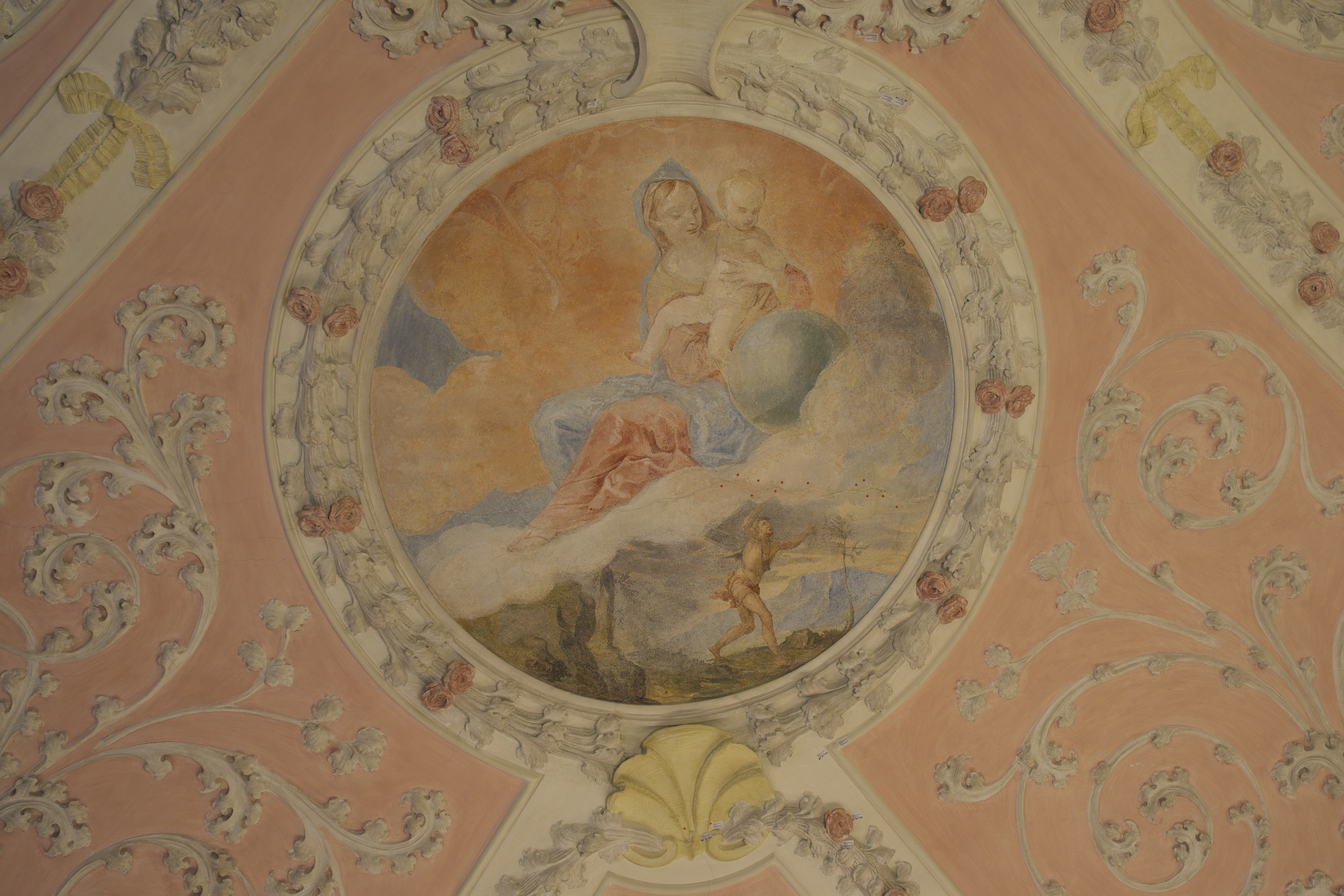 Lesesaal des Archivs des Erzbistums München und Freising, Sakristei der ehemaligen Karmelitenkirche St. Nikolaus am Promenadeplatz in der Altstadt im Stadtbezirk Altstadt-Lehel in München (Bayern/Deutschland), Ausstattung um 1710, Stuck von Francesco Marazzzo, Fresken von Johann Anton Gumpp